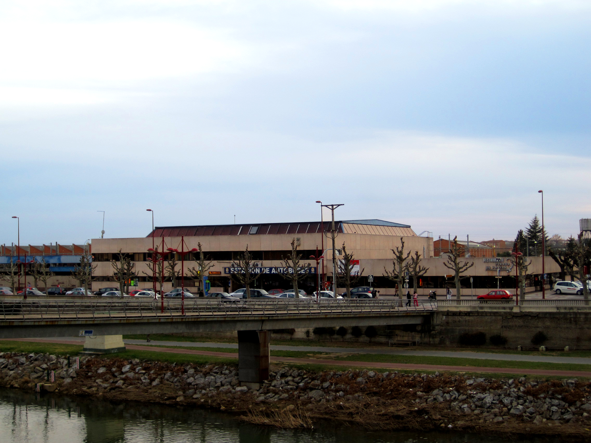 Vista parcial de la estación de autobuses de León (España).